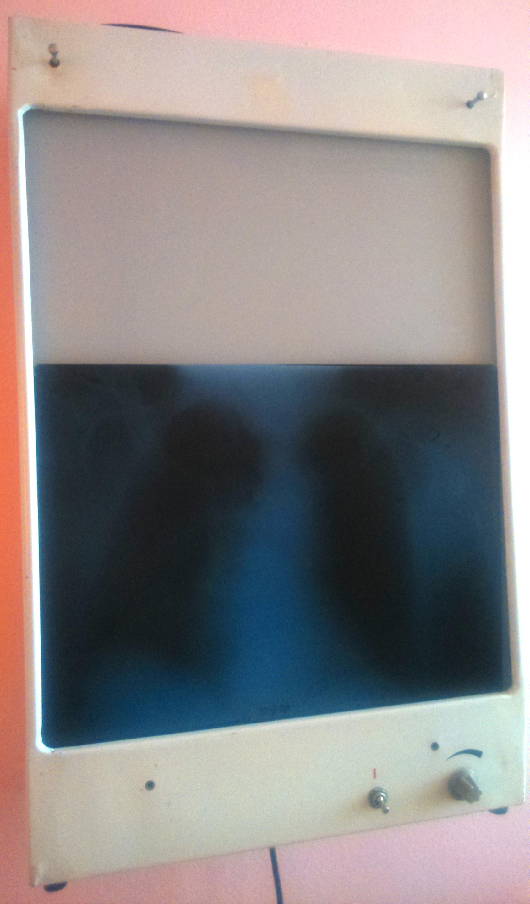 Зовнішній вигляд негатоскопу Н-48, дата виготовлення згідно з маркуванням - 1979 р.